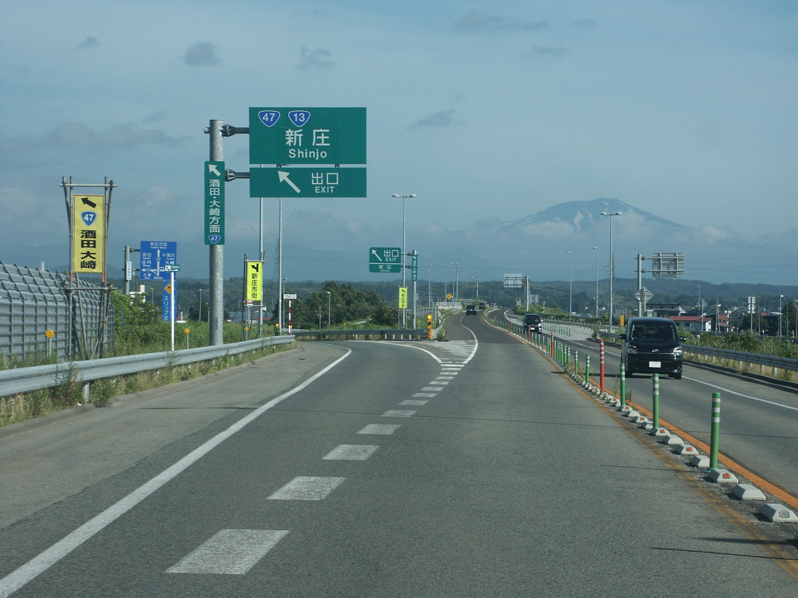 東北中央自動車道（尾花沢新庄道路）新庄IC出口（尾花沢IC方面側）